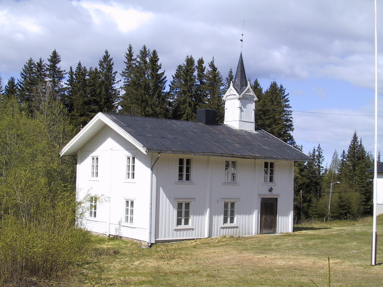 Risberget kirkesal i Våler